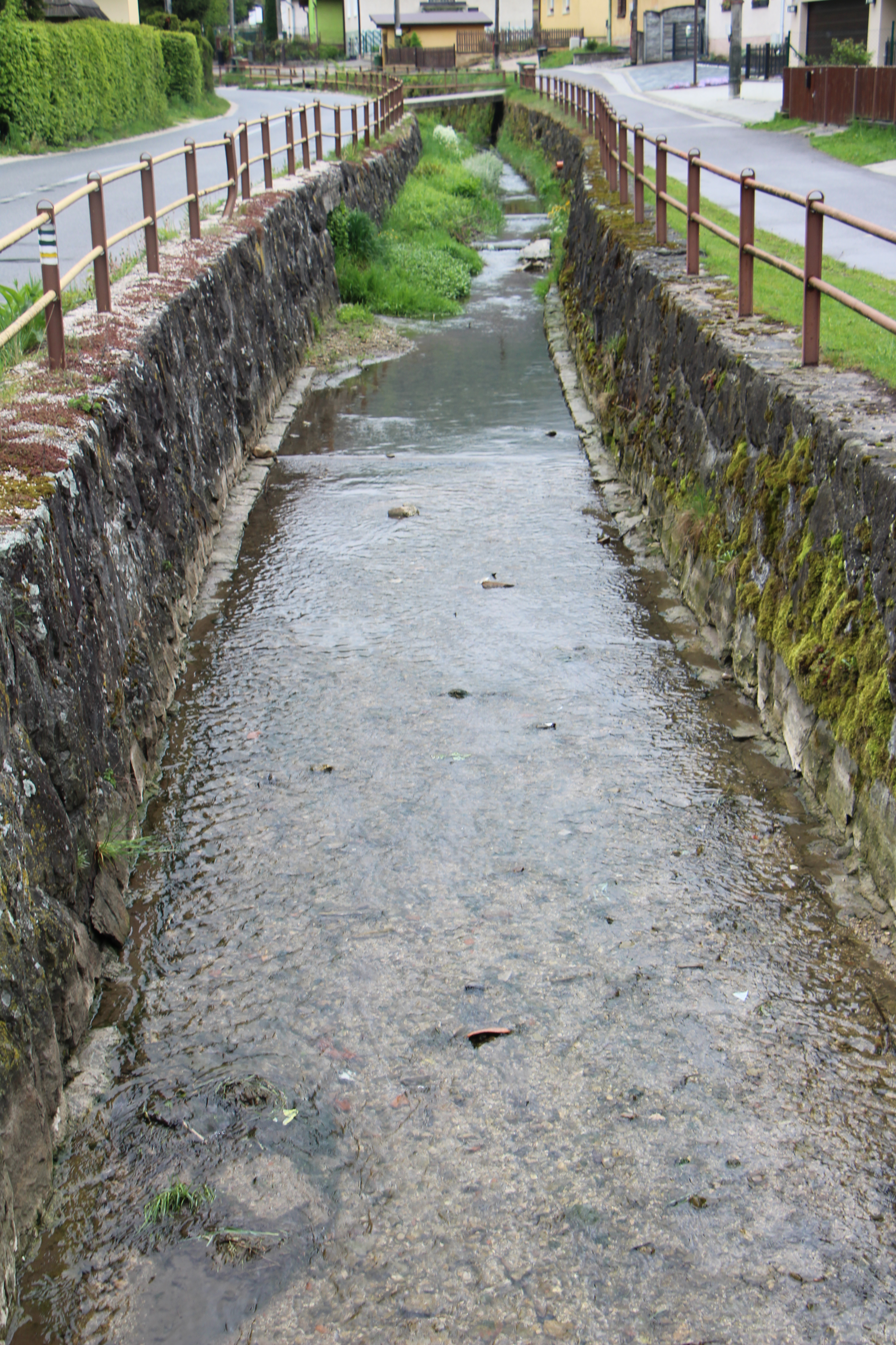 Hradnianka na jar v obci Súľov-Hradná, v časti Súľov.